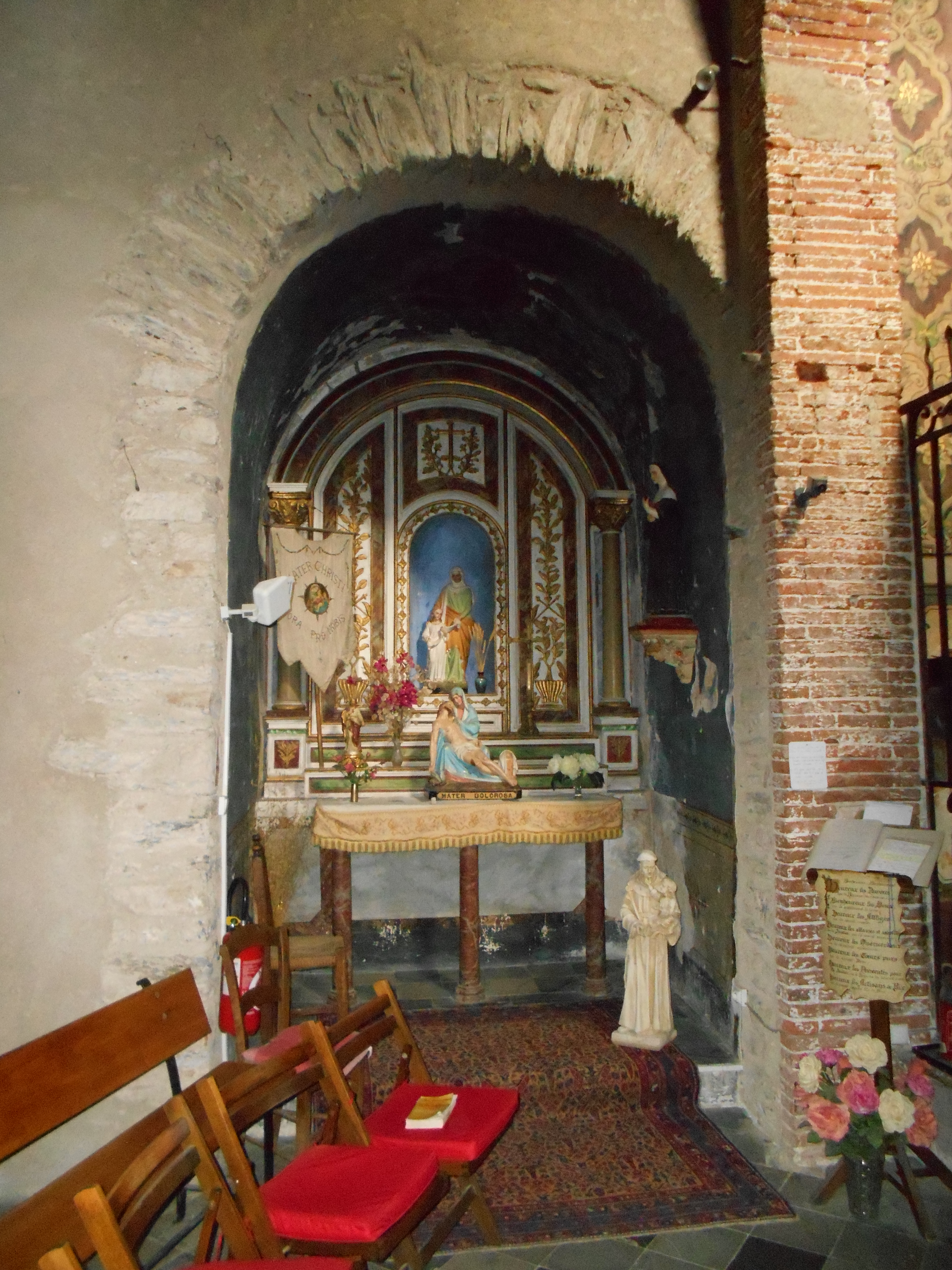 Nostra Senyora de Domanova, de Rodès